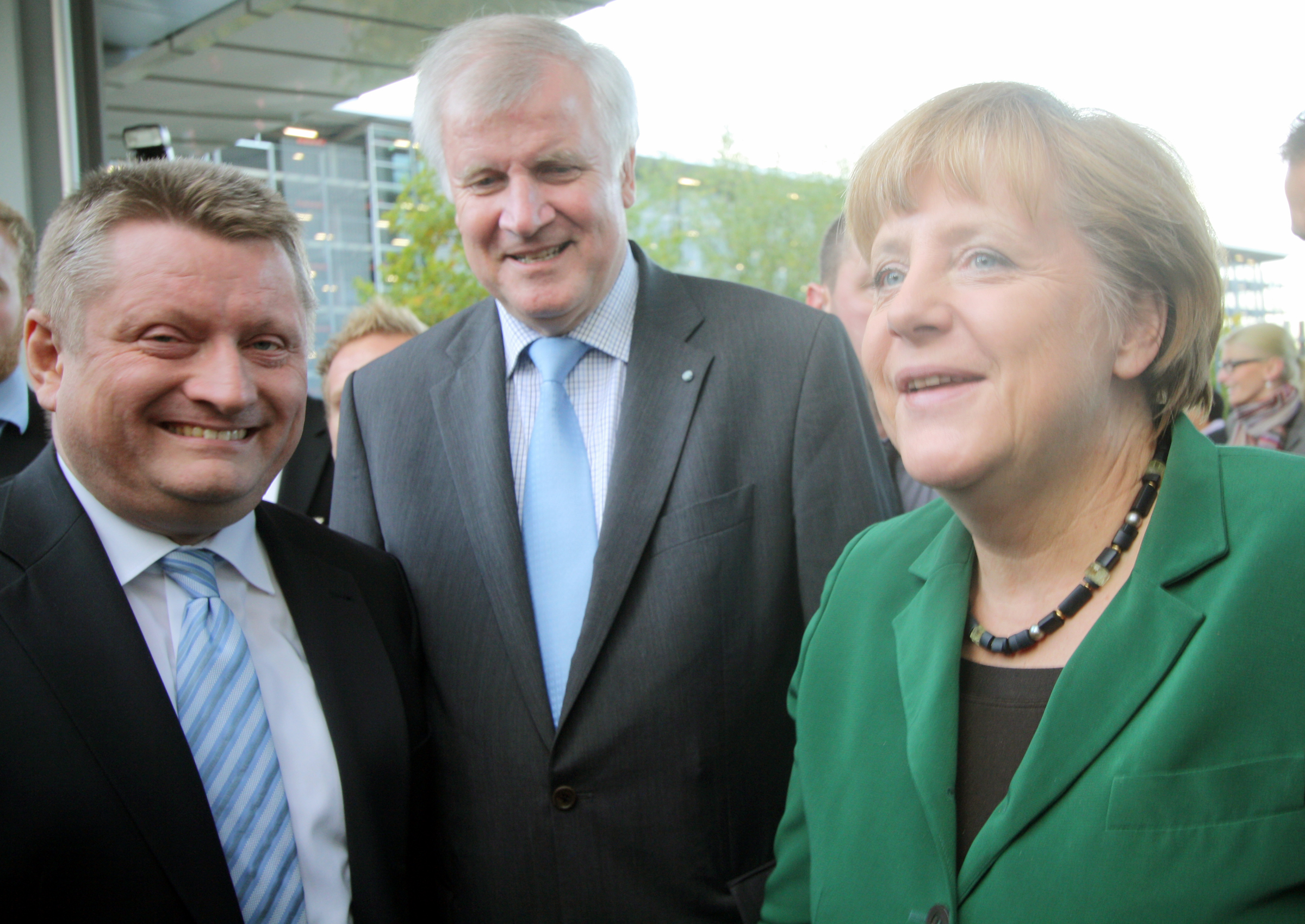 Hermann Gröhe, Horst Seehofer und Angela Merkel auf dem CSU-Parteitag 2012 am 19.10.2012 in München.